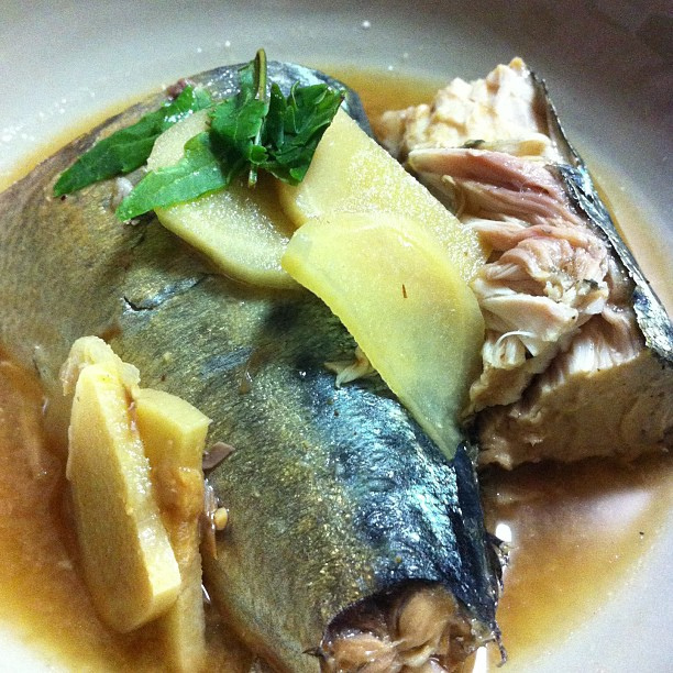 今夜は鯖の味噌煮を作りました。 #dinner